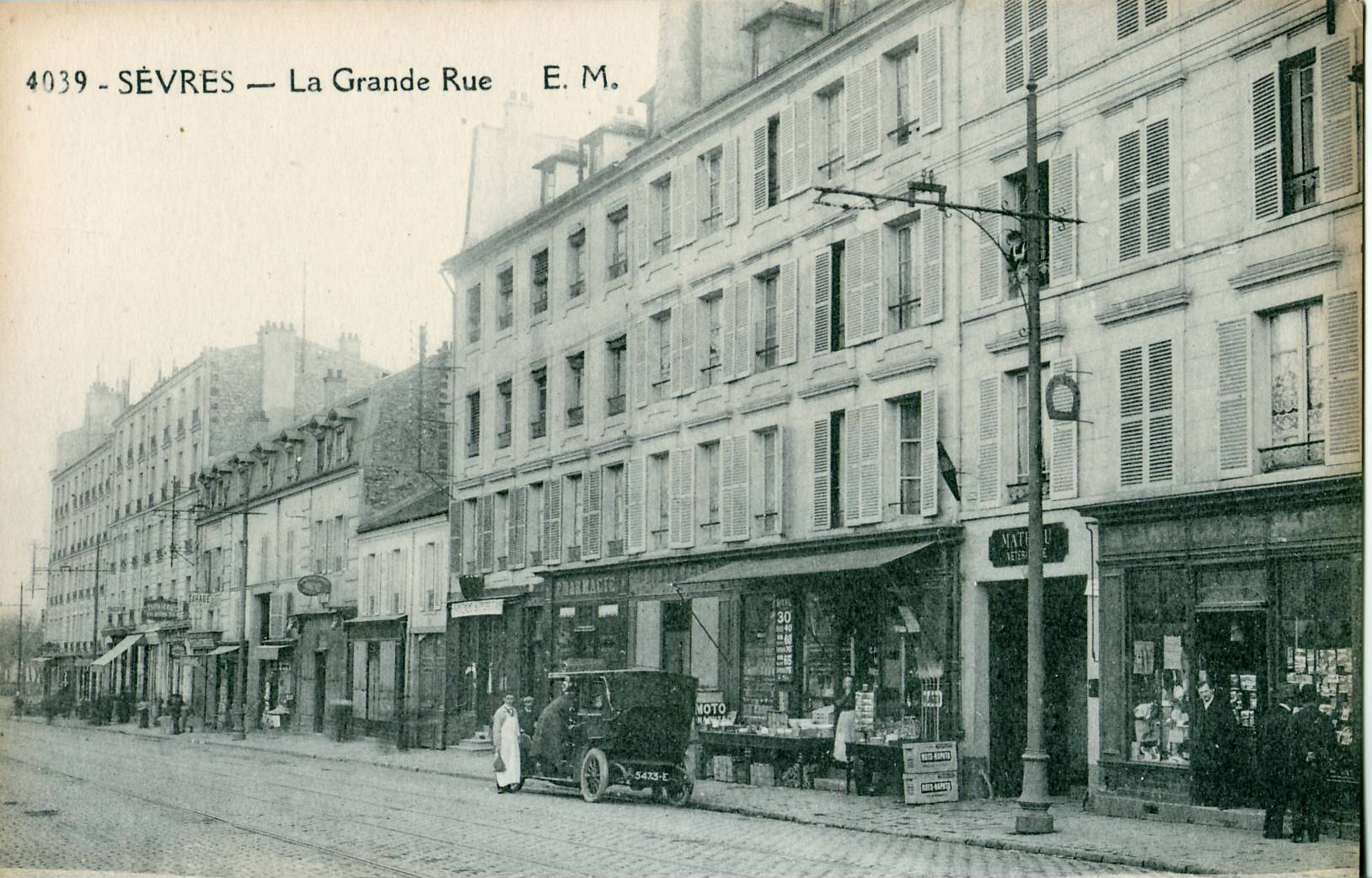 Carte postale ancienne éditée par EM; n°4039 :Sèvres - La Grande RueIl s'agit de l'ancienne RN 10. On voit en gros plan un poteau supportant la ligne électrique du Tramway de Sèvres à Versailles